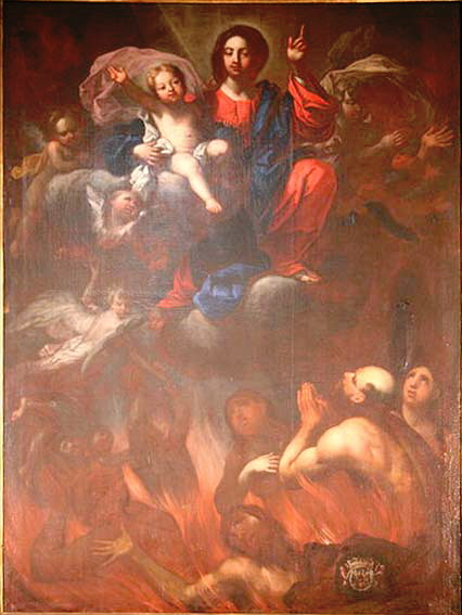 La Vierge à l'enfant et le purgatoire, tableau de Michel Serre (1658-1733) se trouvant dans l'église Saint-Cannat à Marseille.Dimension du tableau : hauteur=2.30 largeur=1.60